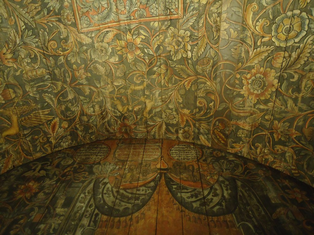 DSC08893 Israel